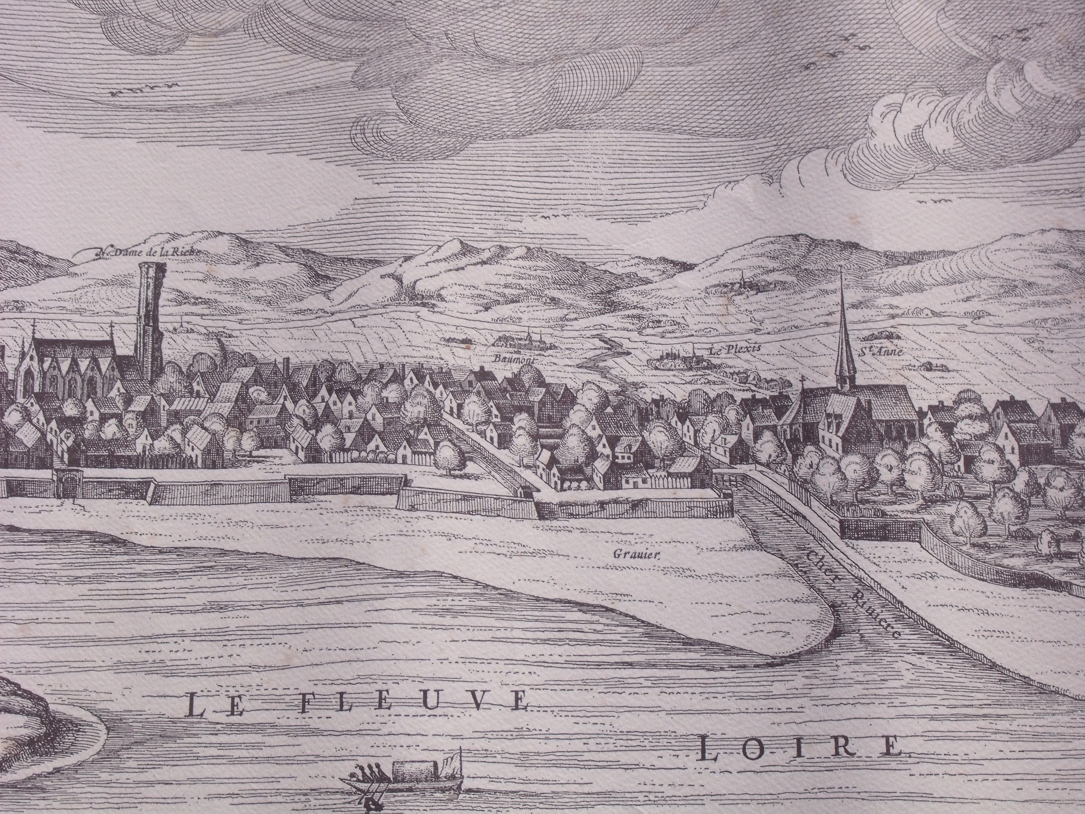 Quartier notre dame la riche,extrait de l'estampe gravé par monsieur LAES JANSZ VISSCHER en 1625 tiré d'un original sur vélin de 2.35 m sur 41 cm, propriété de desprez37